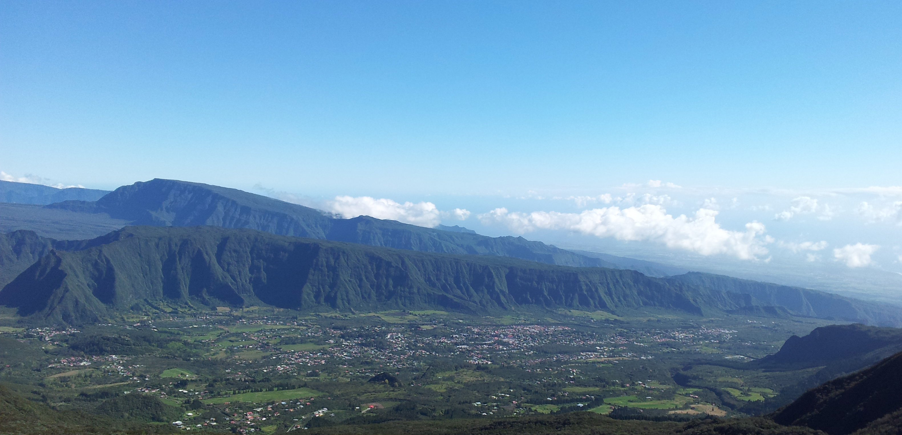 Îlet Patience